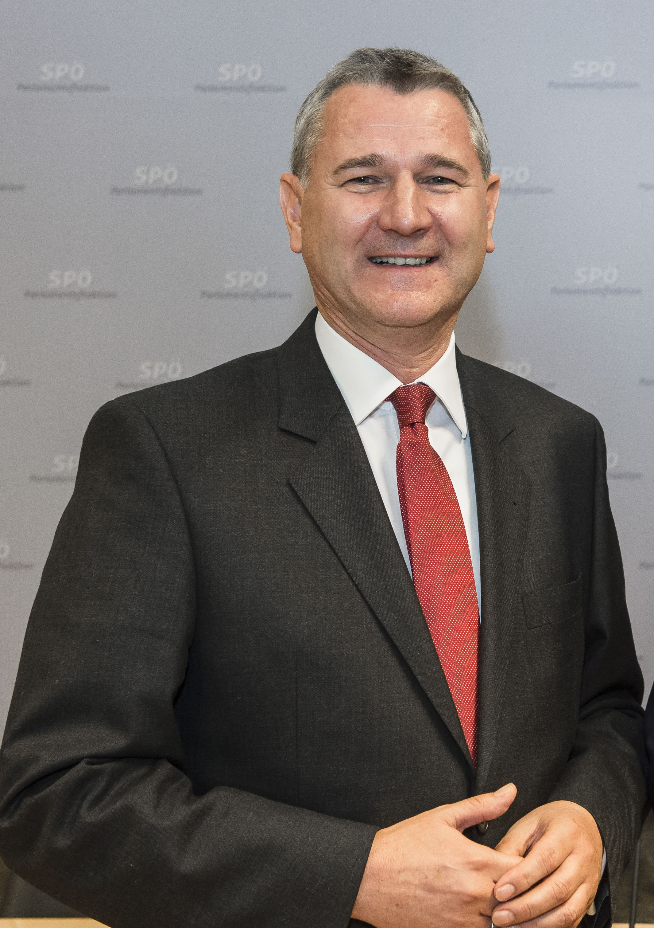 SPÖ Vorstand bei Sitzung im Parlament. Im Bild: Georg Niedermühlbichler und Bundeskanzler Christian Kern.